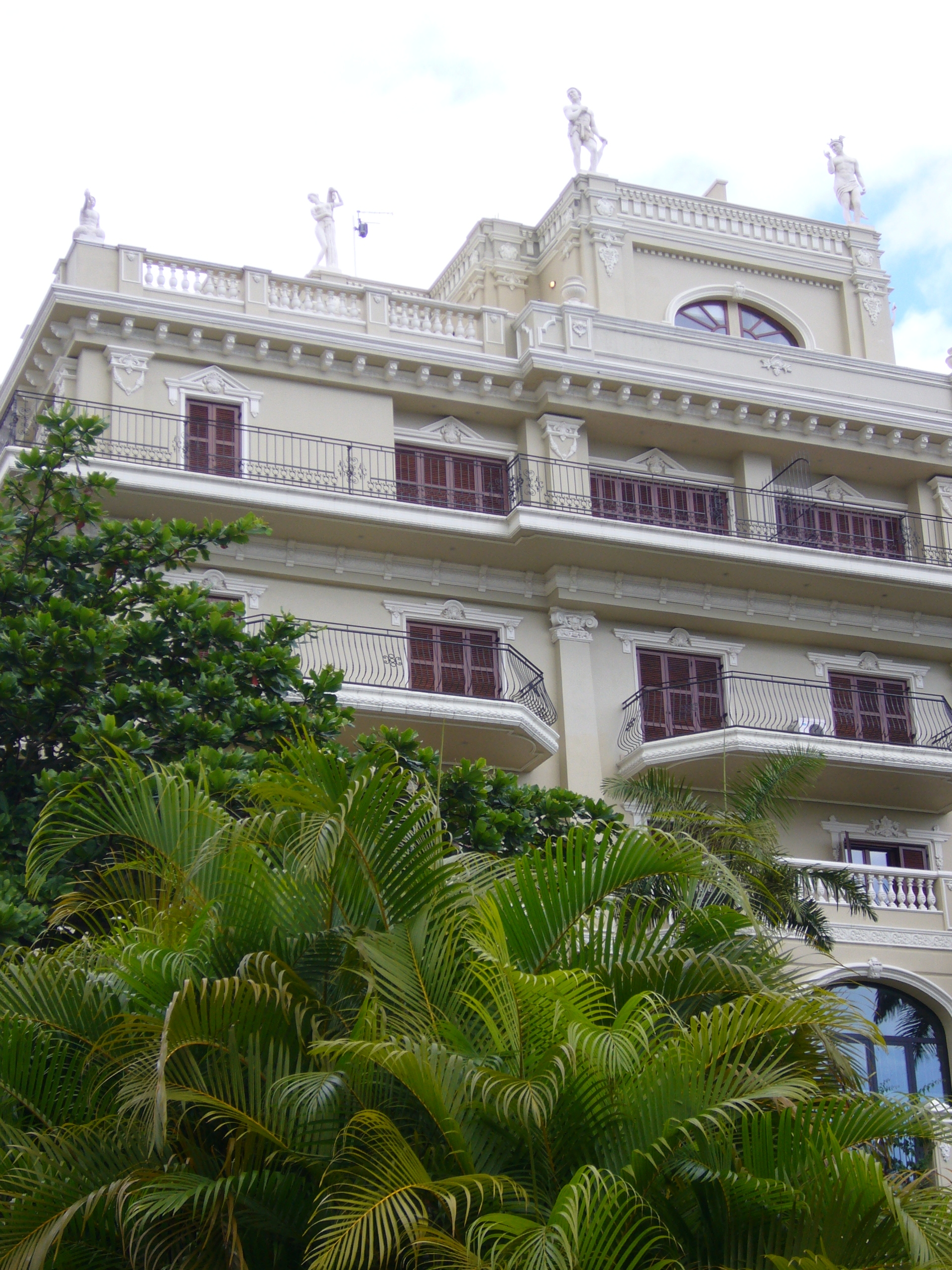 Bauwerk in Boca Chica